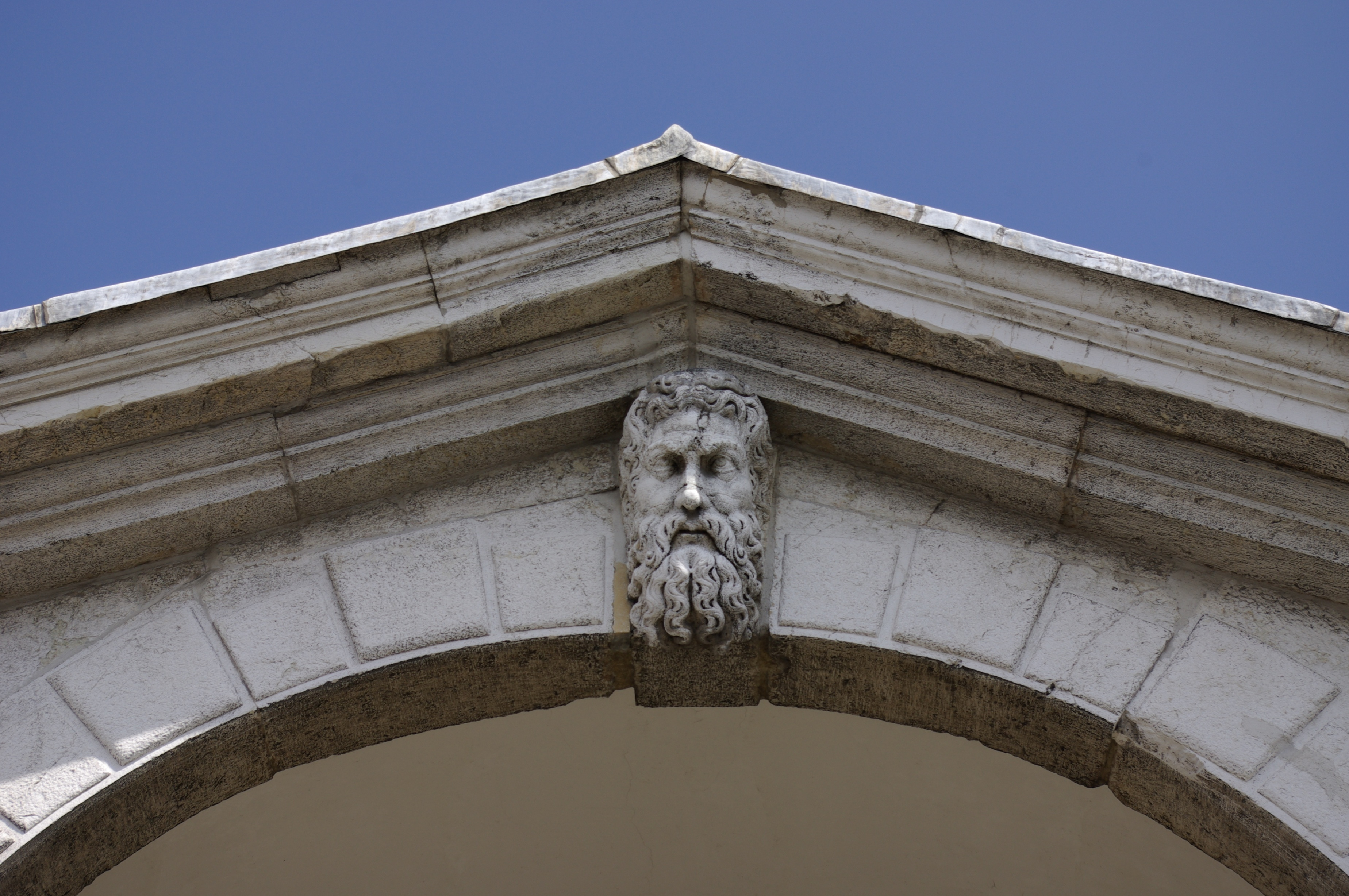 Detail der Rialtobrücke in Venedig